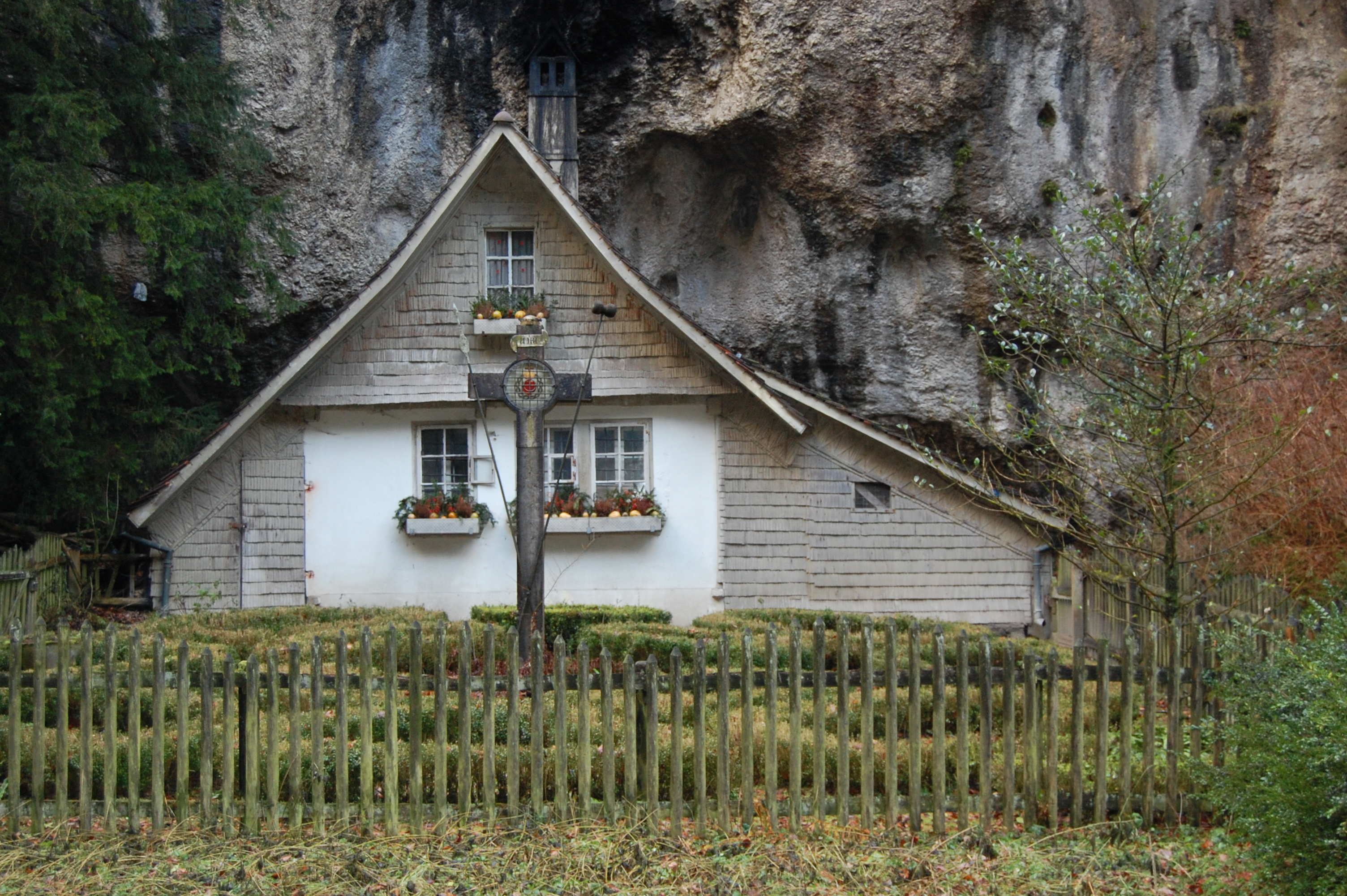 Das Häuschen des Waldbruders in der Einsiedelei Sankt Verena